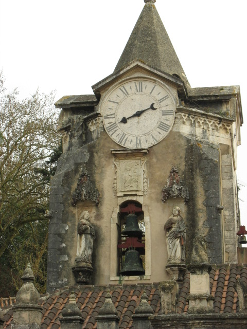 Campanário da Igreja de N. Sra do Pópulo (Caldas da Rainha - Portugal)